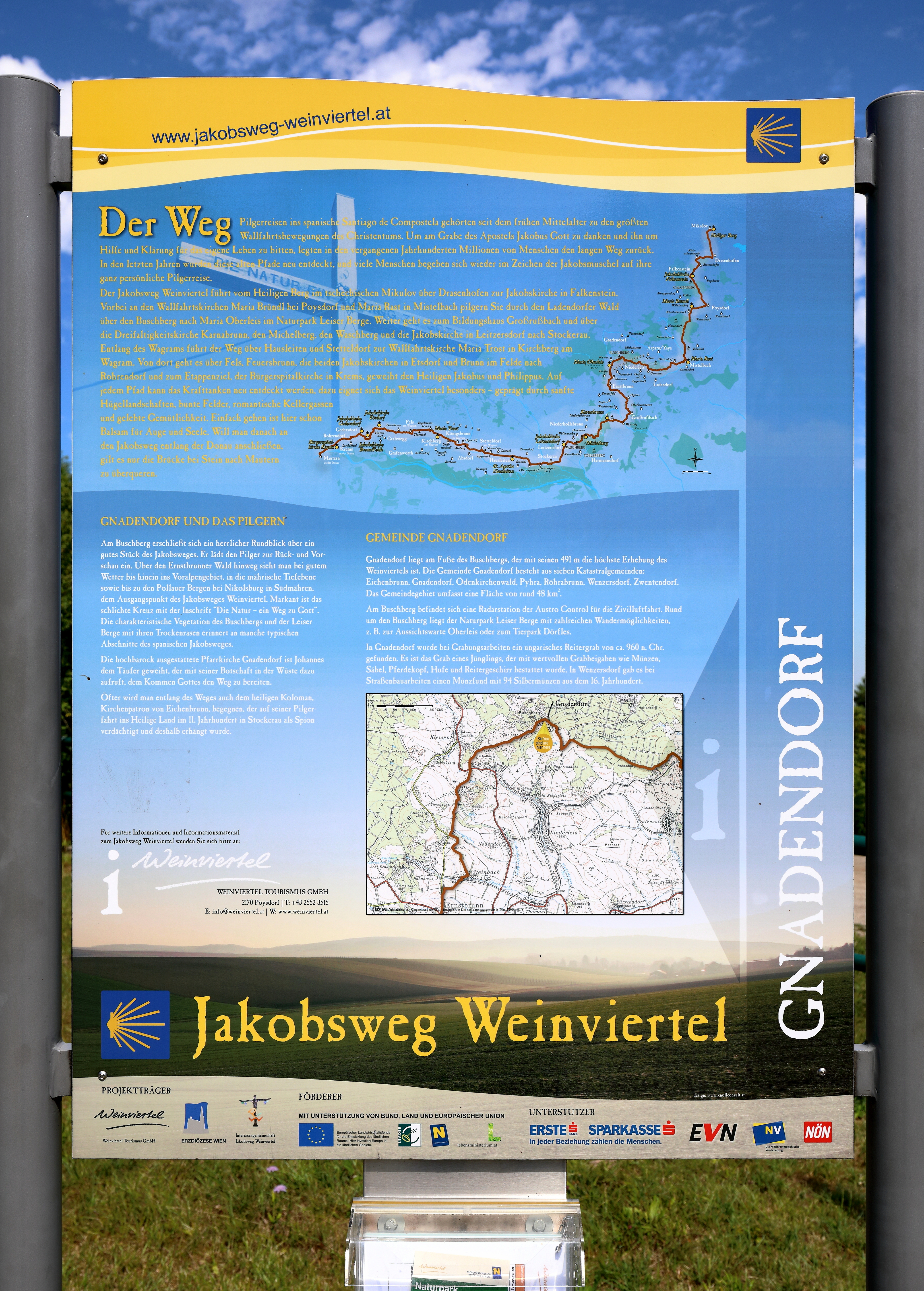 Infotafel über den Jakobsweg Weinviertel am Parkplatz auf dem Buschberg.